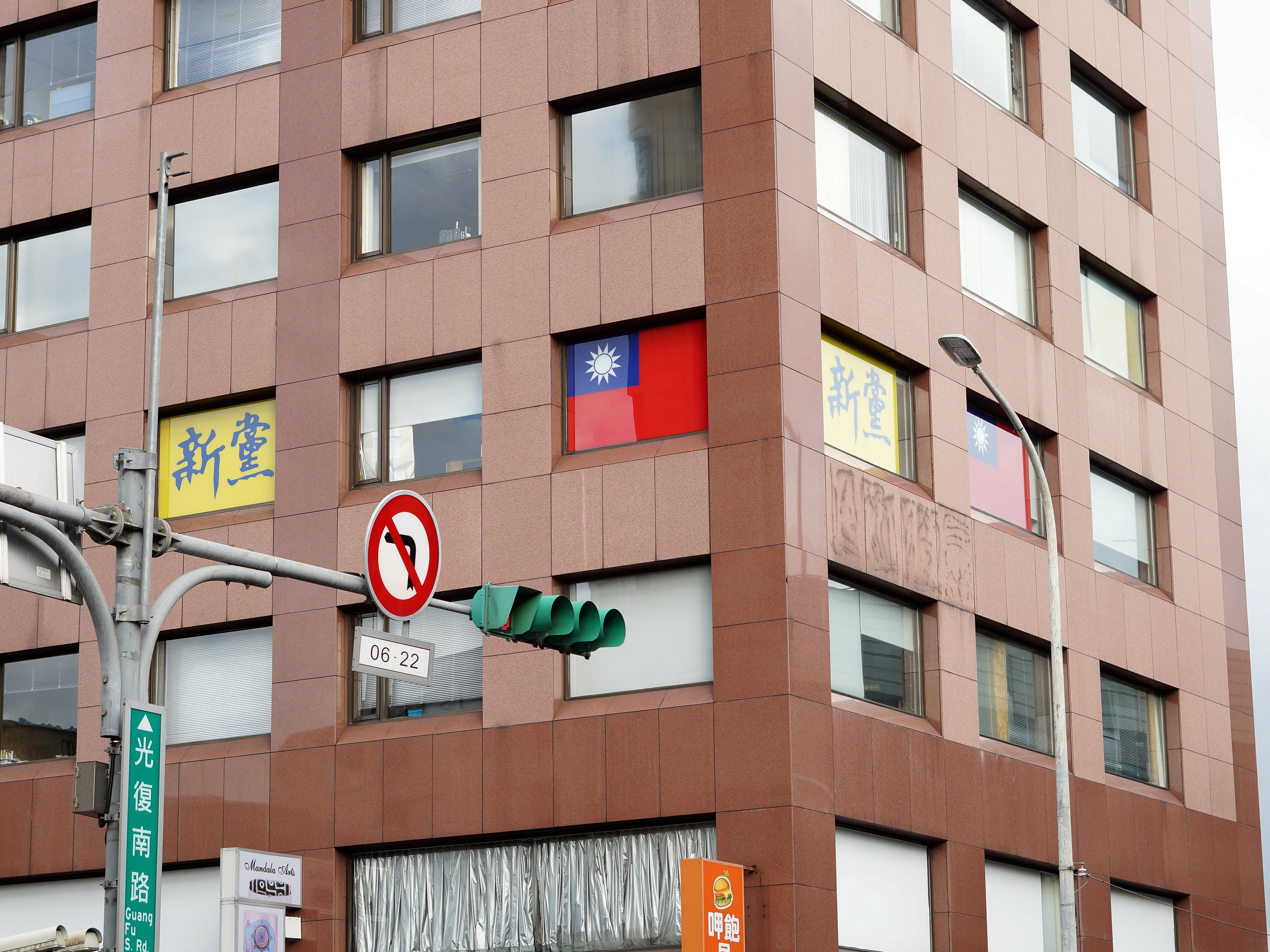 新黨全國委員會，位於臺北市松山區光復南路65號4樓（佳華建設合麗大樓），外牆玻璃窗展示新黨黨旗與中華民國國旗。